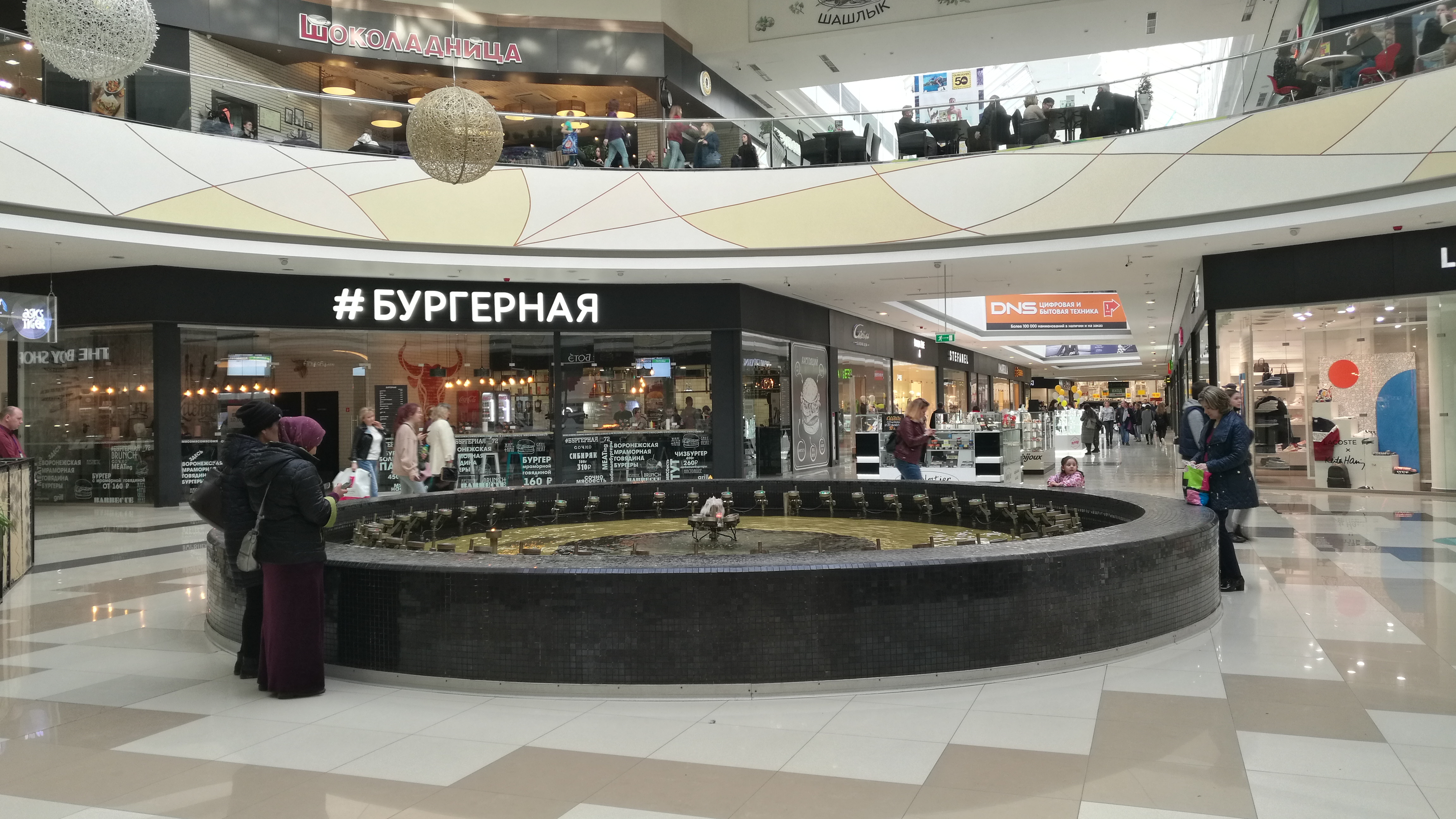 Aĉetcentro Kristall. Tjumeno, Rusio.